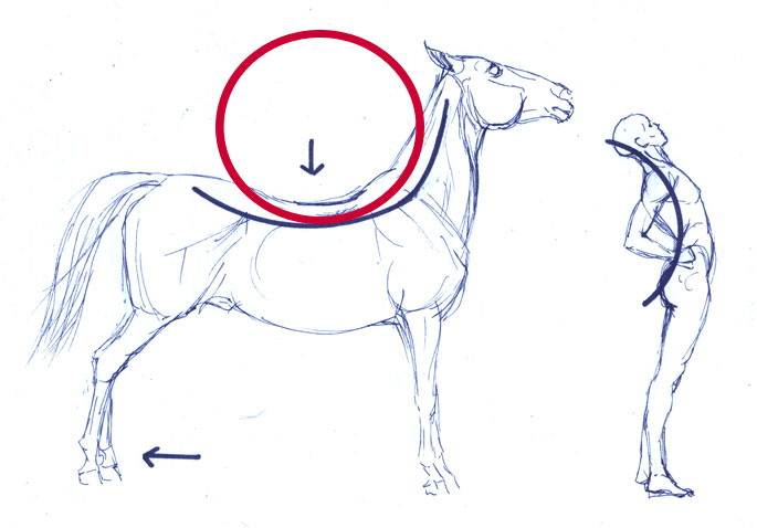 Durchgedrückter Rücken = Belastung von Wirbelsäule und Gelenken